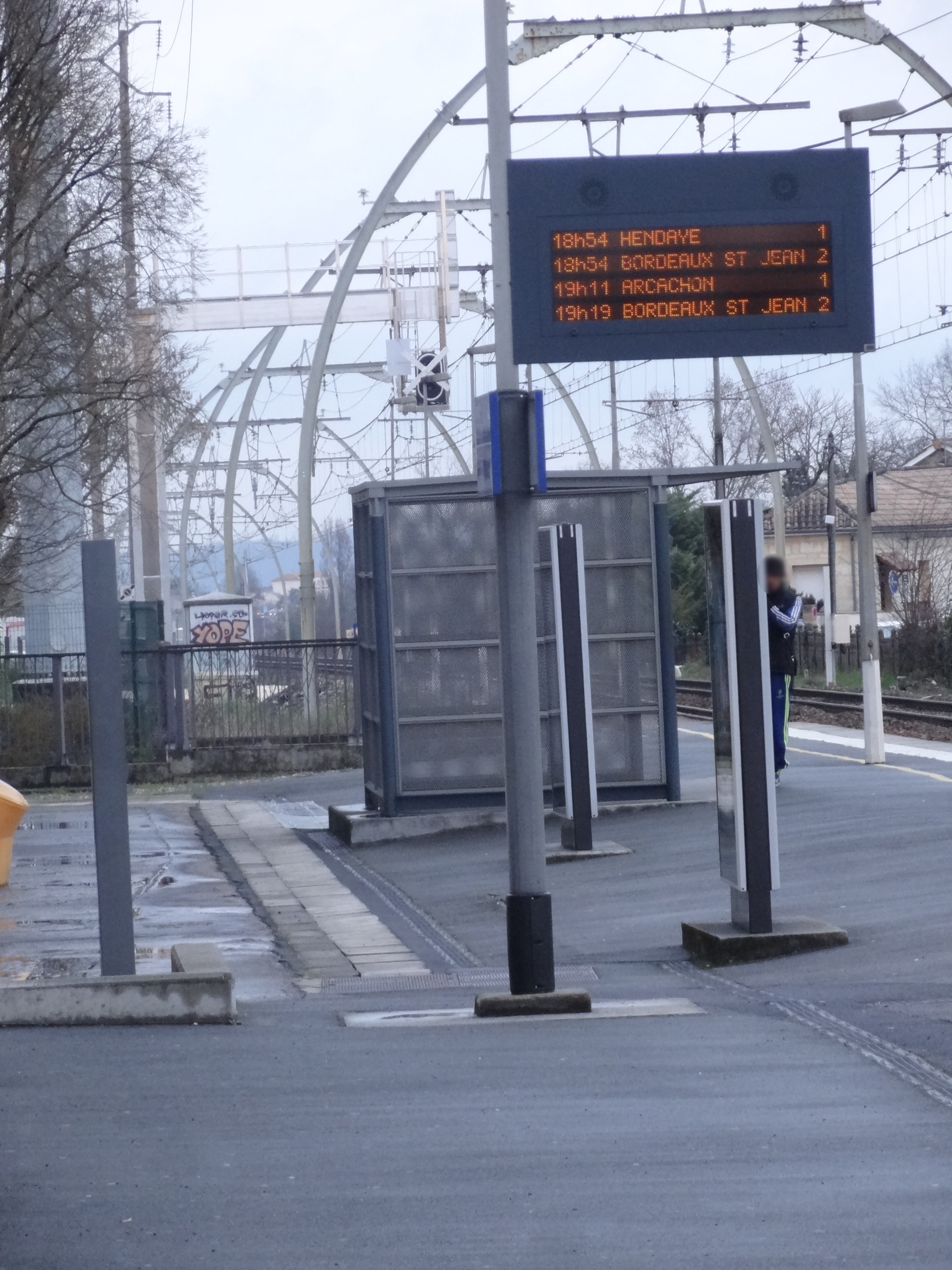 Tableau audio visuel de la gare de Pessac